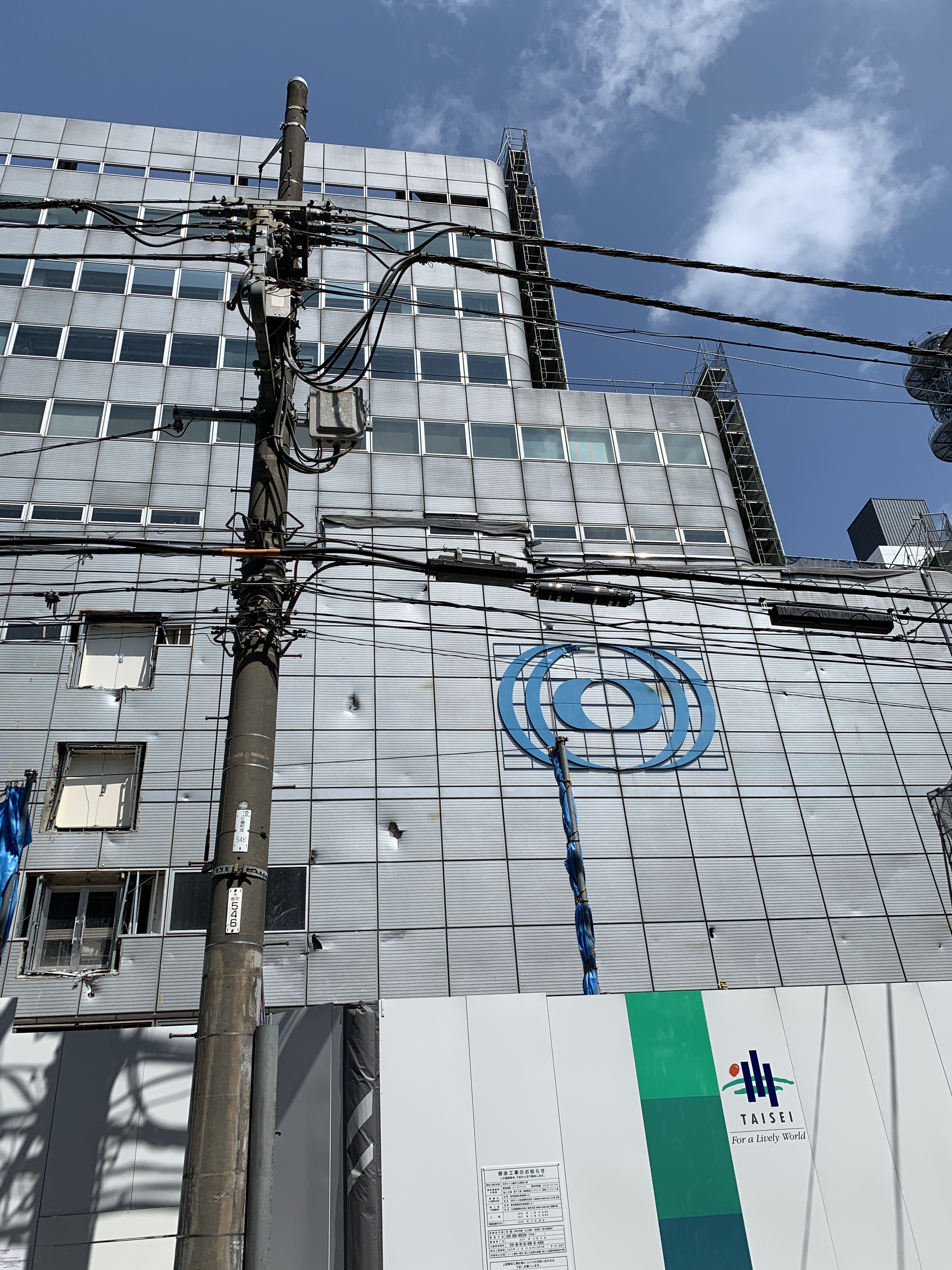 南本館竣工後の部分増築で長年隠されていた日本テレビ旧シンボルマークの巨大レリーフ。画面左側には増築時に切り取られた出入口接続部の壁の痕跡も確認できる。